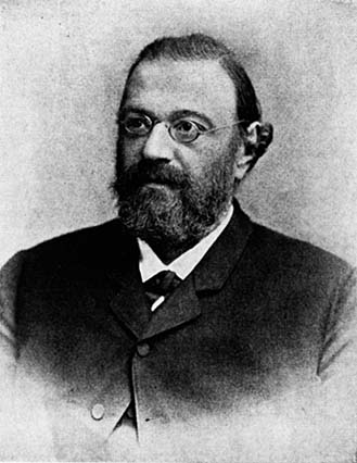 Wilhelm Friedrich Kühne